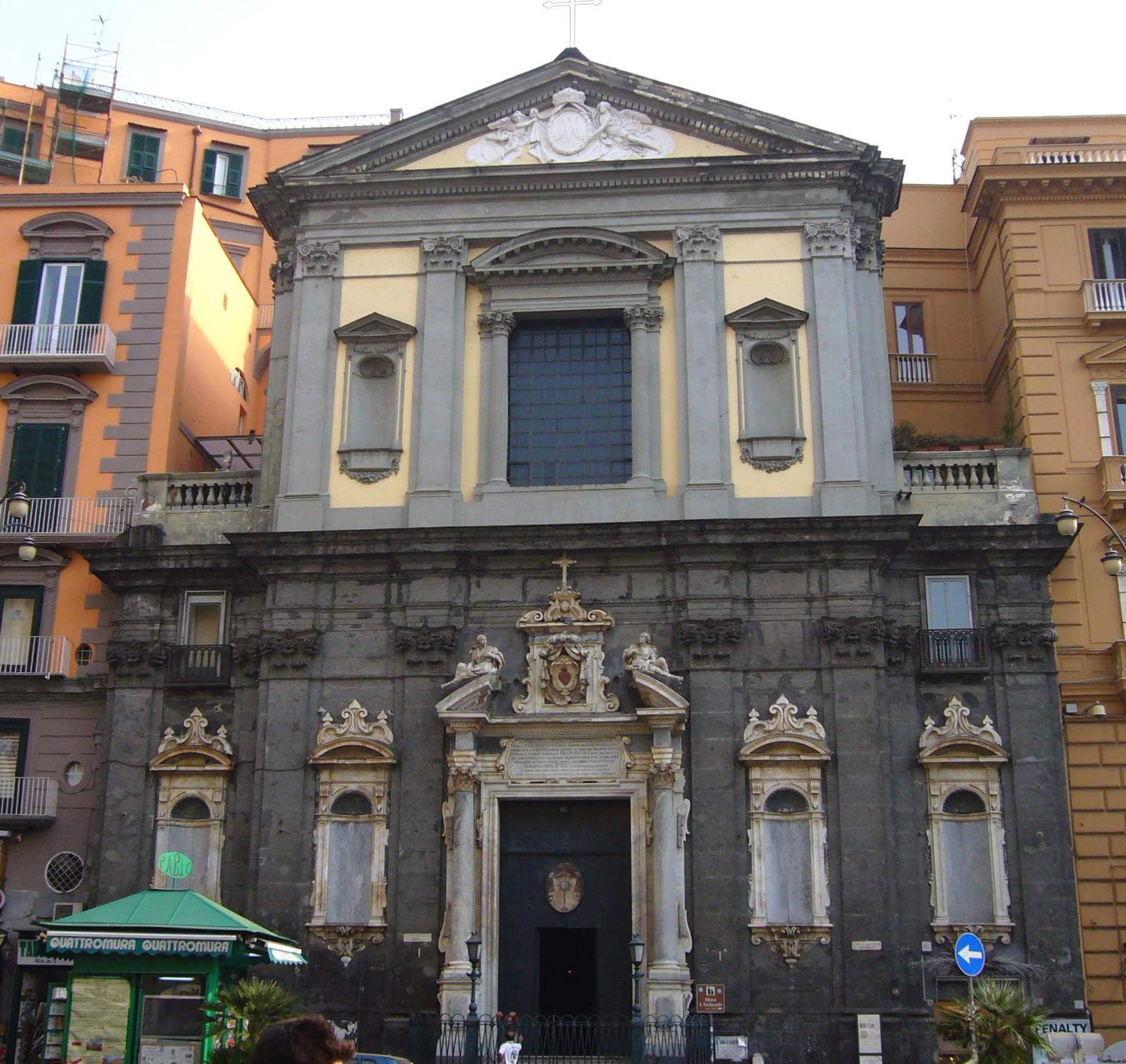 Napoli, San Ferdinando